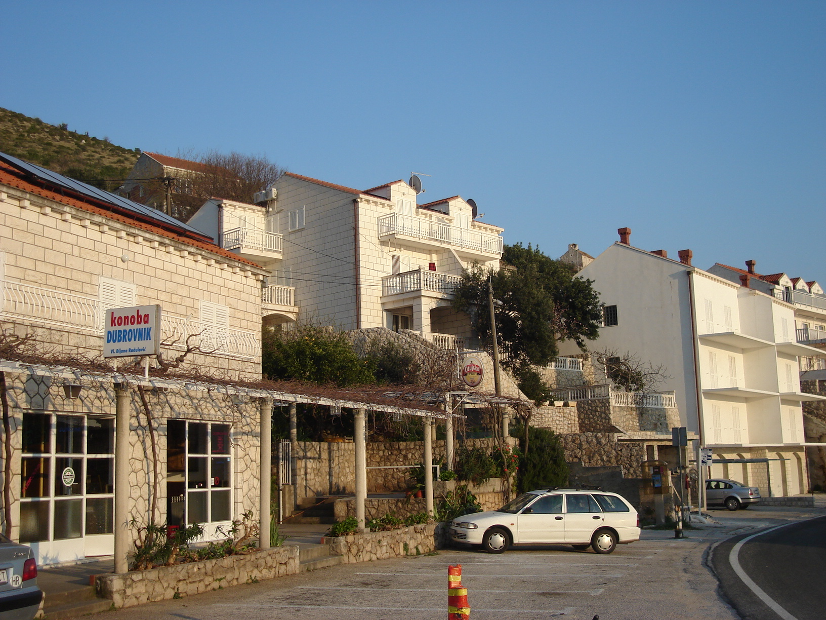 Croatian village Lozica near Dubrovnik